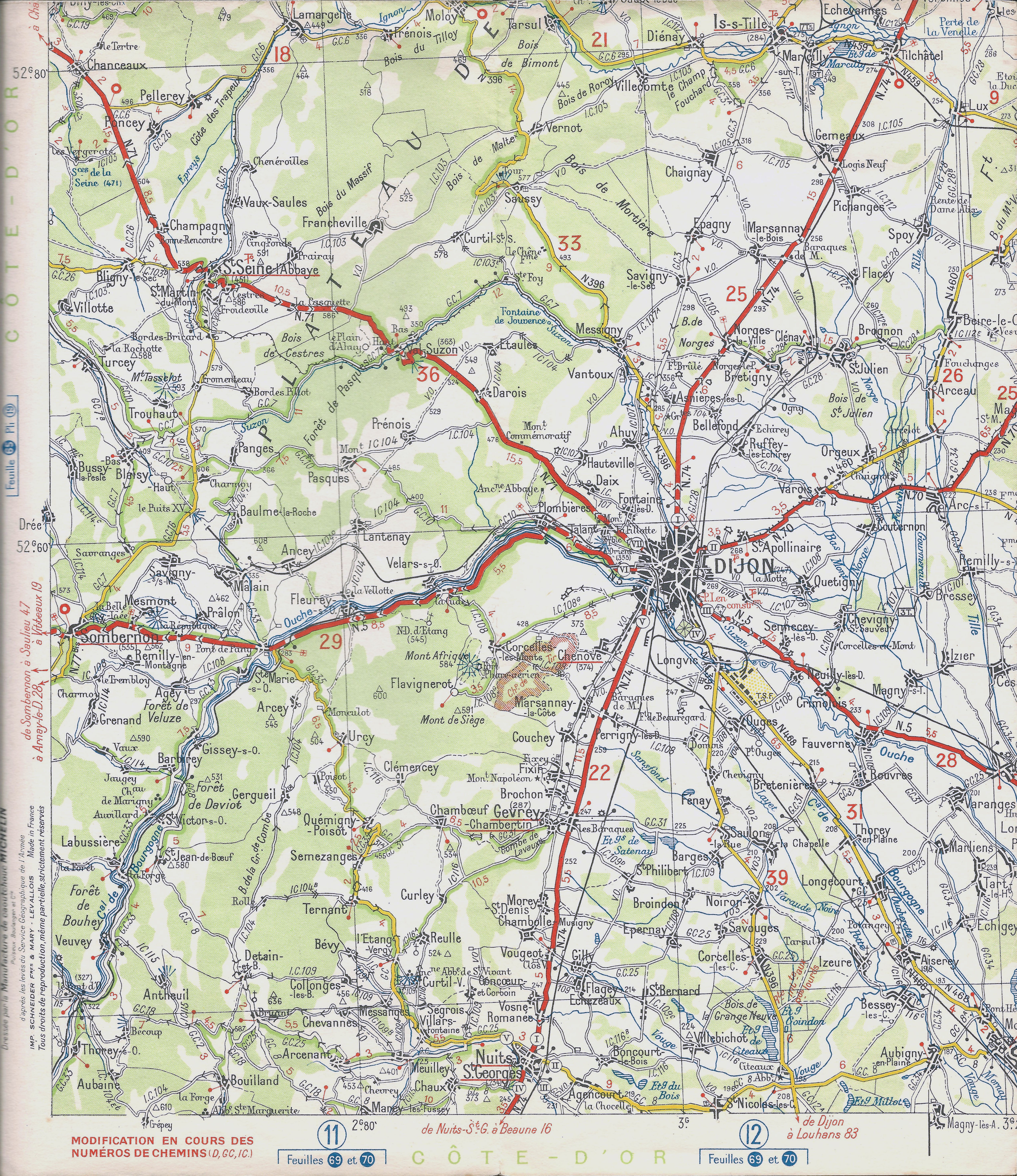 Deel (Dijon) van Michelin kaart nr 66 Frankrijk) uitgegeven in 1940. Dit moet voor de Duitse inval van 10 mei 1940 verkocht zijn.